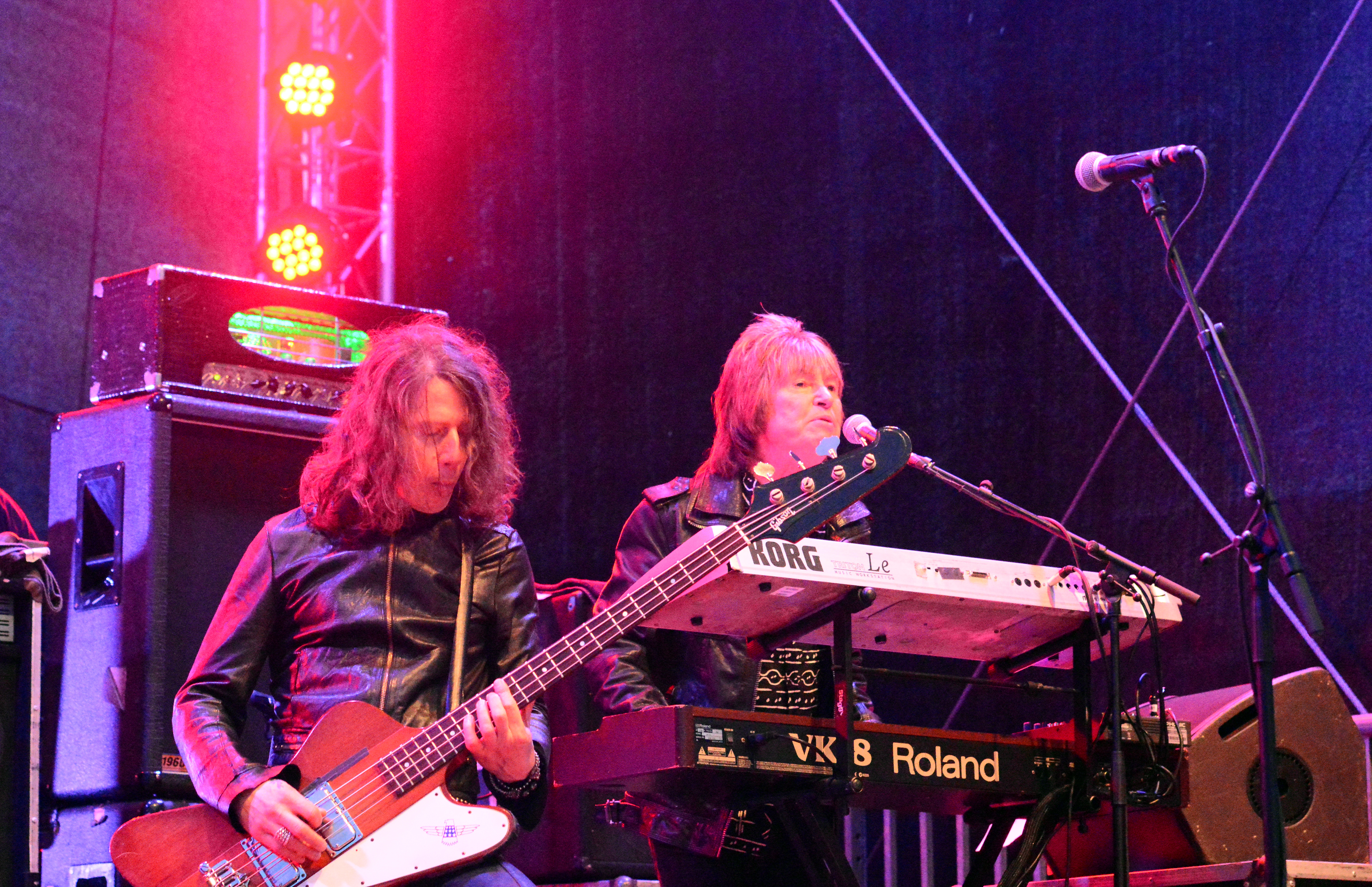 Rob de Luca und Paul Raymond von UFO bei den „Hamburg Harley Days“